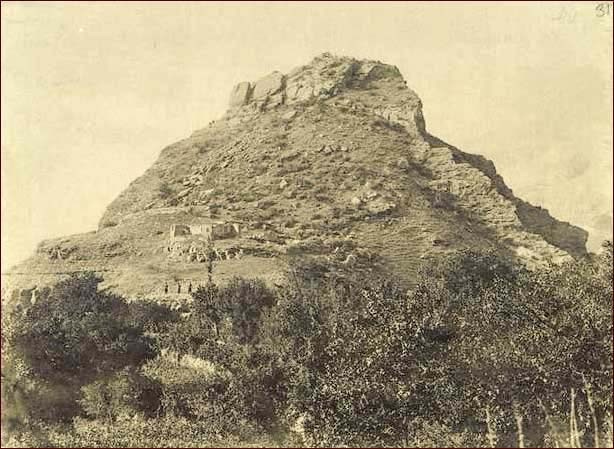 Гора Ахульго